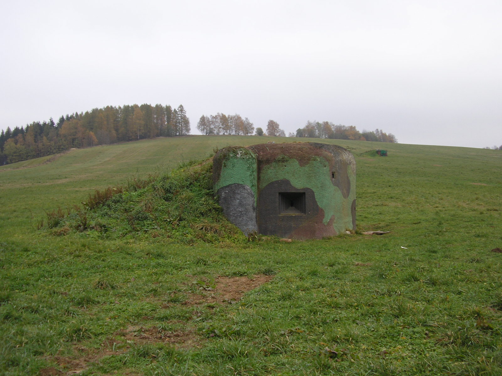 Ropiky, Kralicka oblas u K-S 14 U cihelny